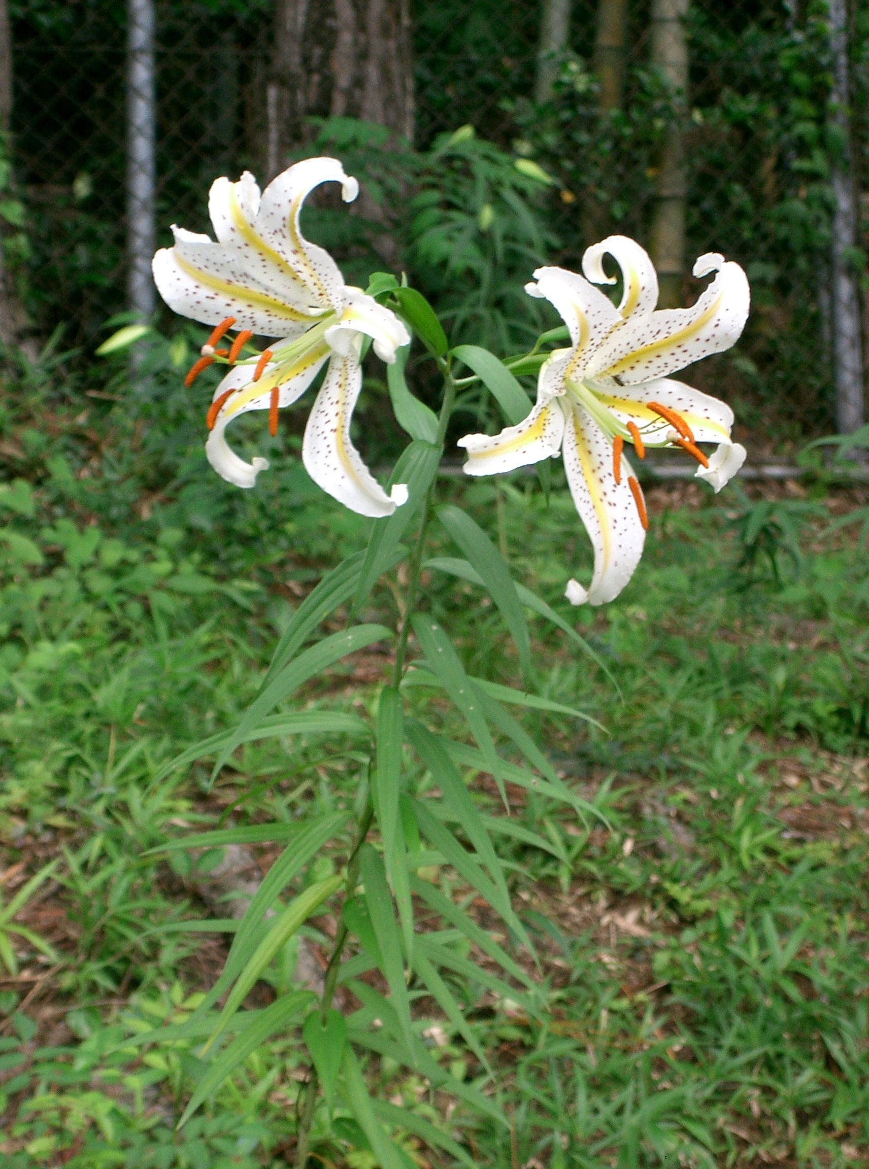 Lilium auratum